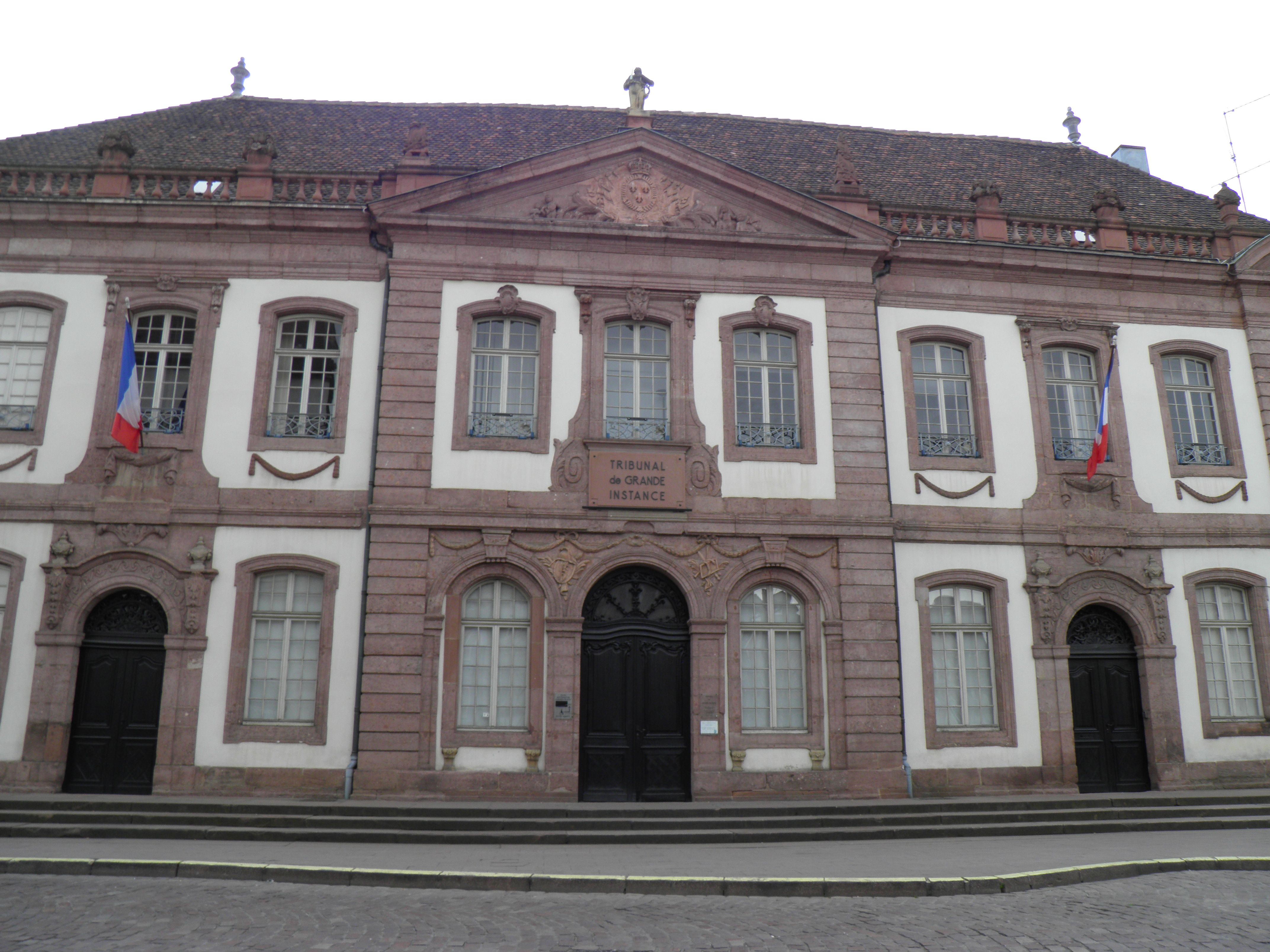 Grand-Rue et ancien palais du Conseil souverain d'Alsace à Colmar (Haut-Rhin, France).